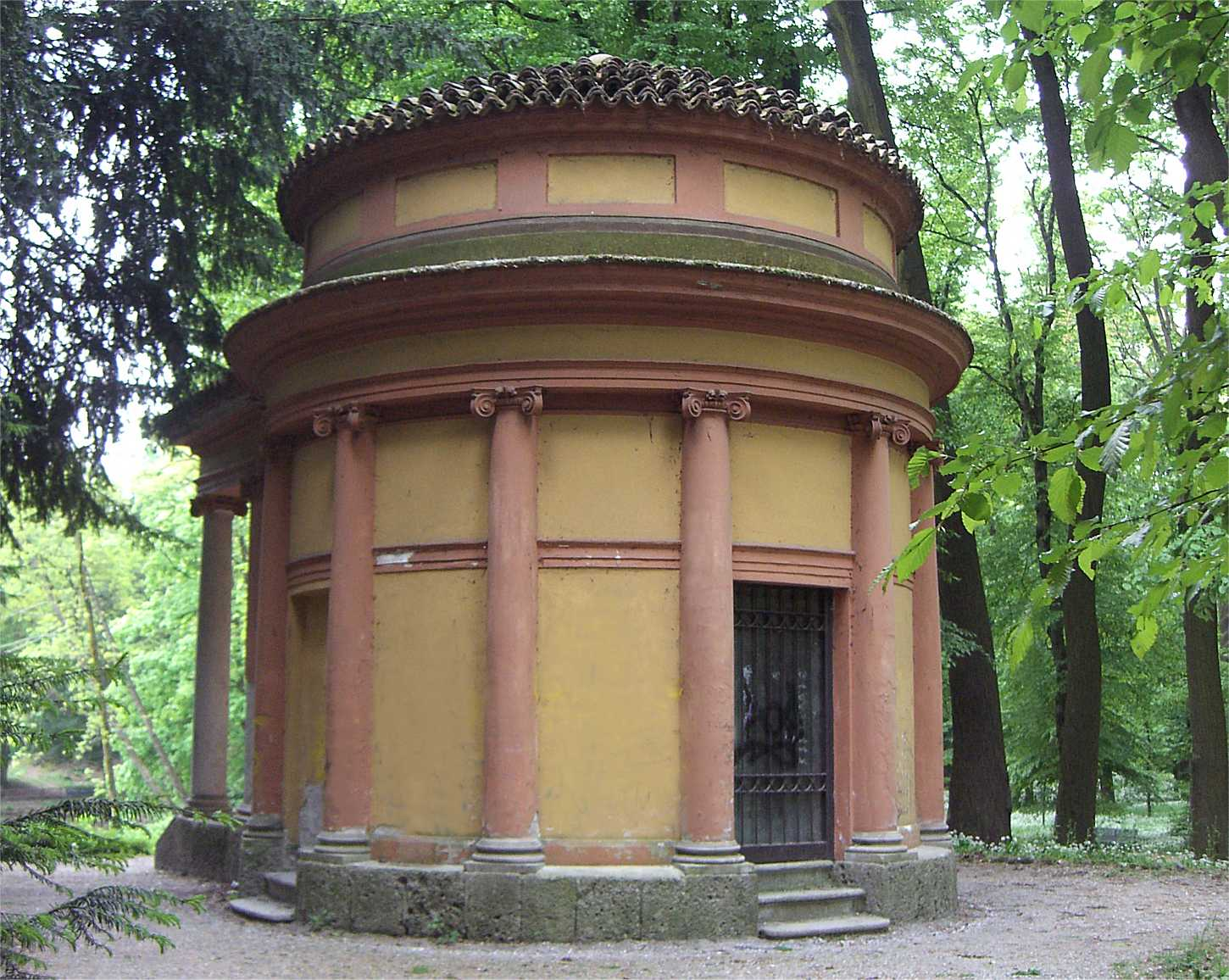 MB Monza Giardini della Villa Reale tempietto dorico lato posteriore rispetto al laghetto dei cigni su cui prospetta la facciata neoclassica